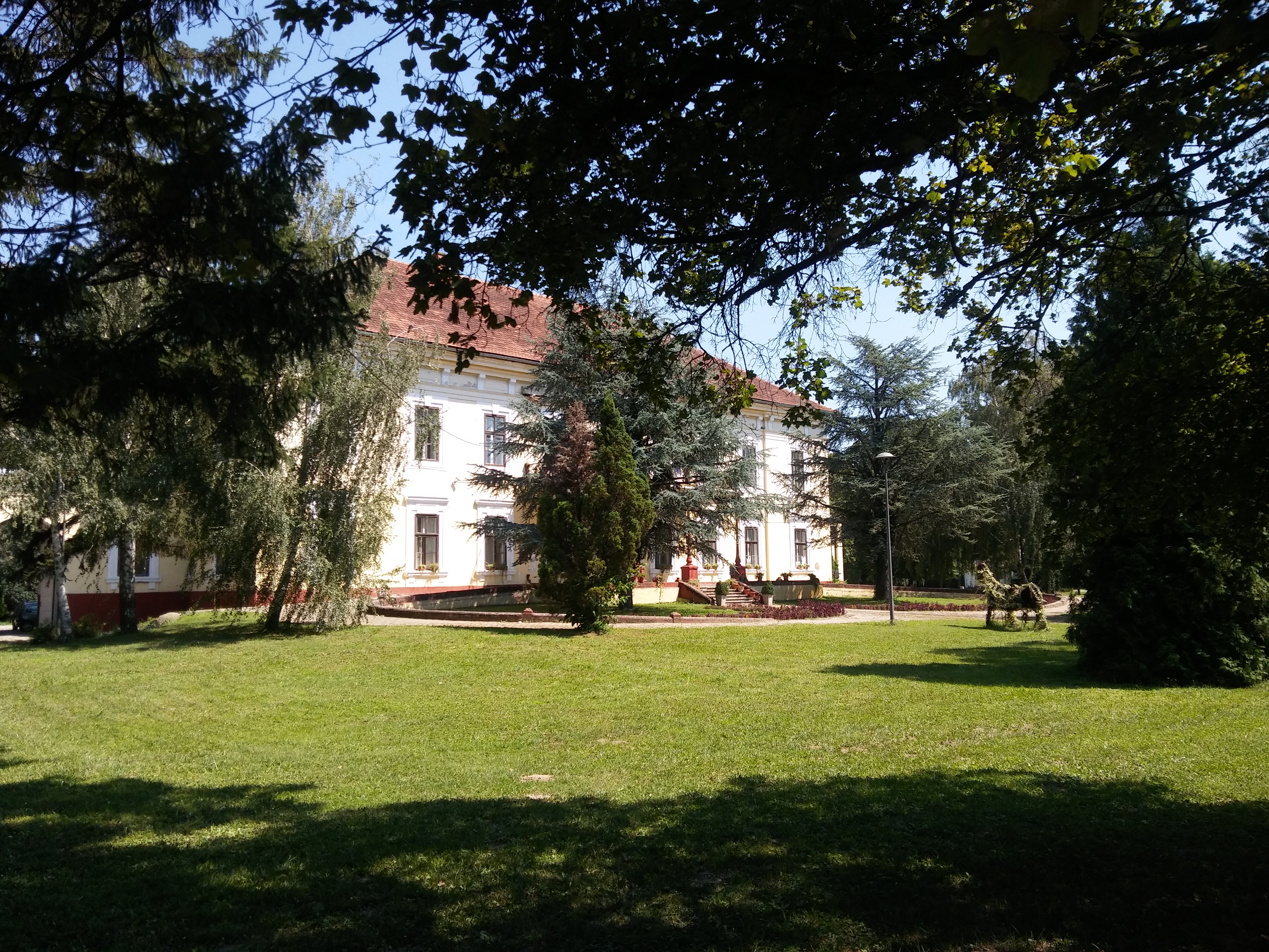 Српски (ћирилица): Пољопривредна школа са домом ученика у Футогу